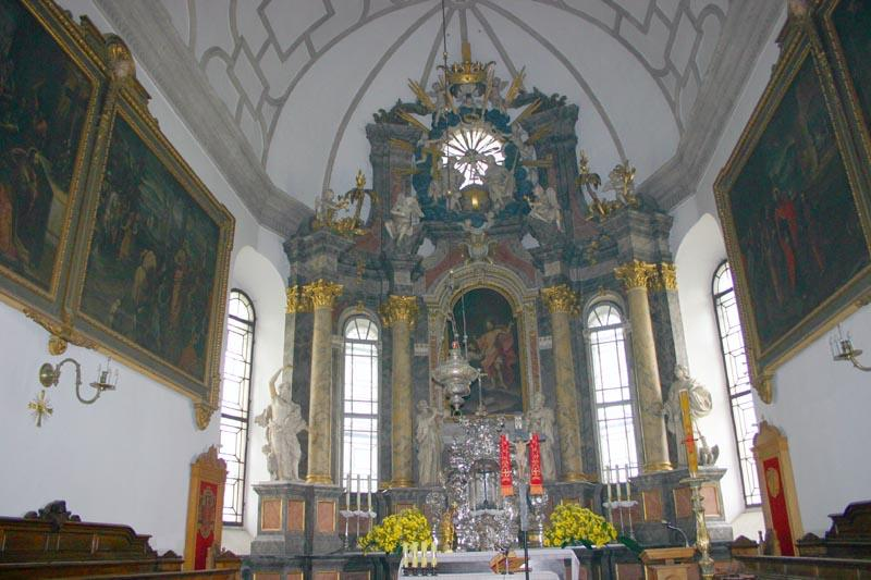 Zamosc (Poland)